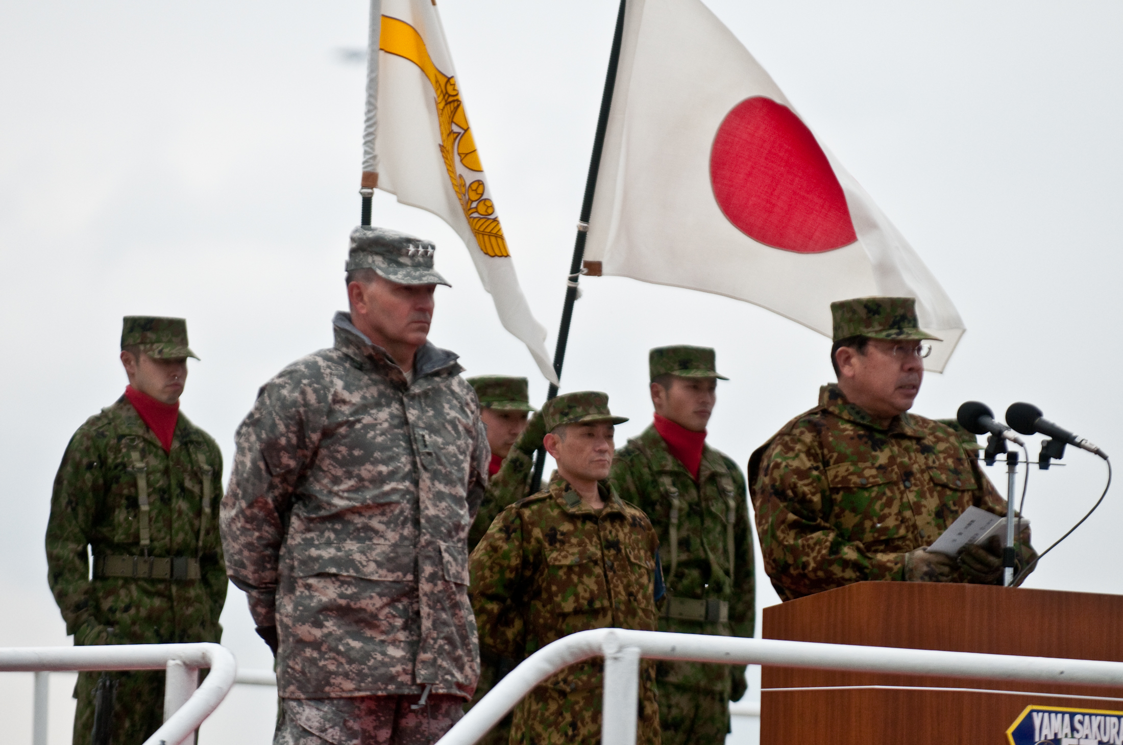 北部方面総監・酒井健陸将（日米共同方面隊指揮所演習）